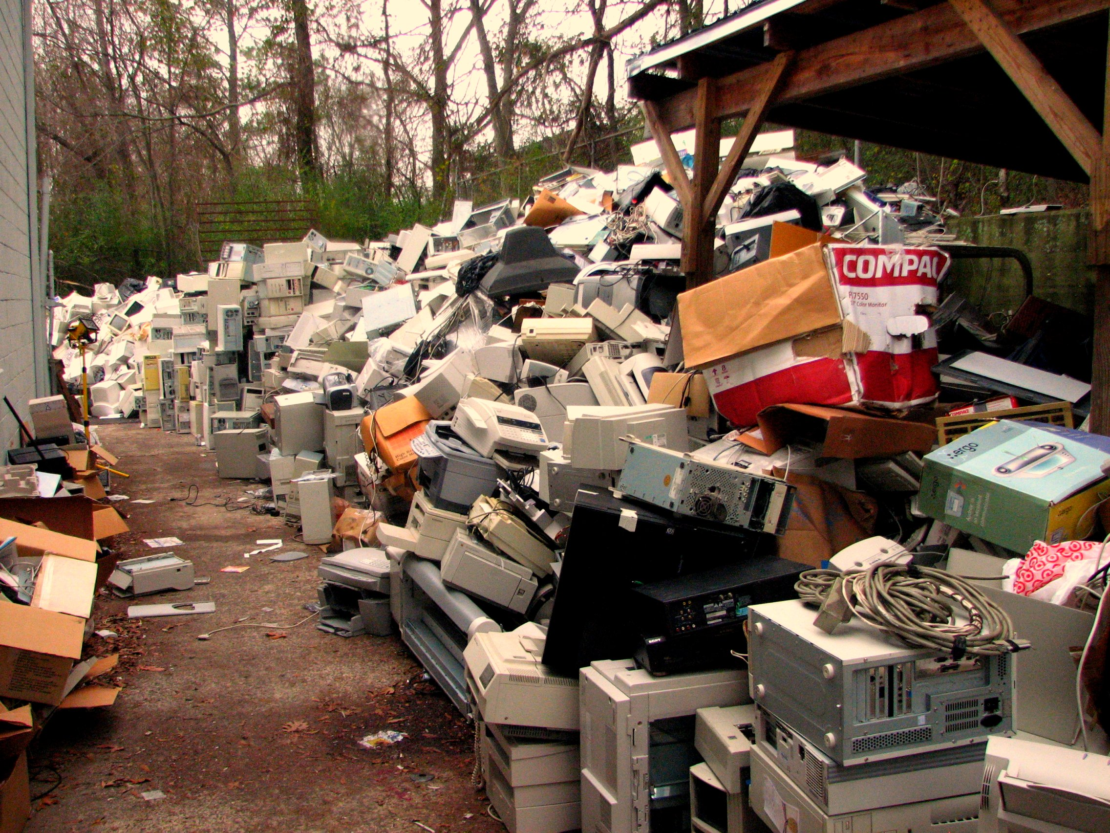 pila de chatarra electronica (Birmingham, Alabama, USA)